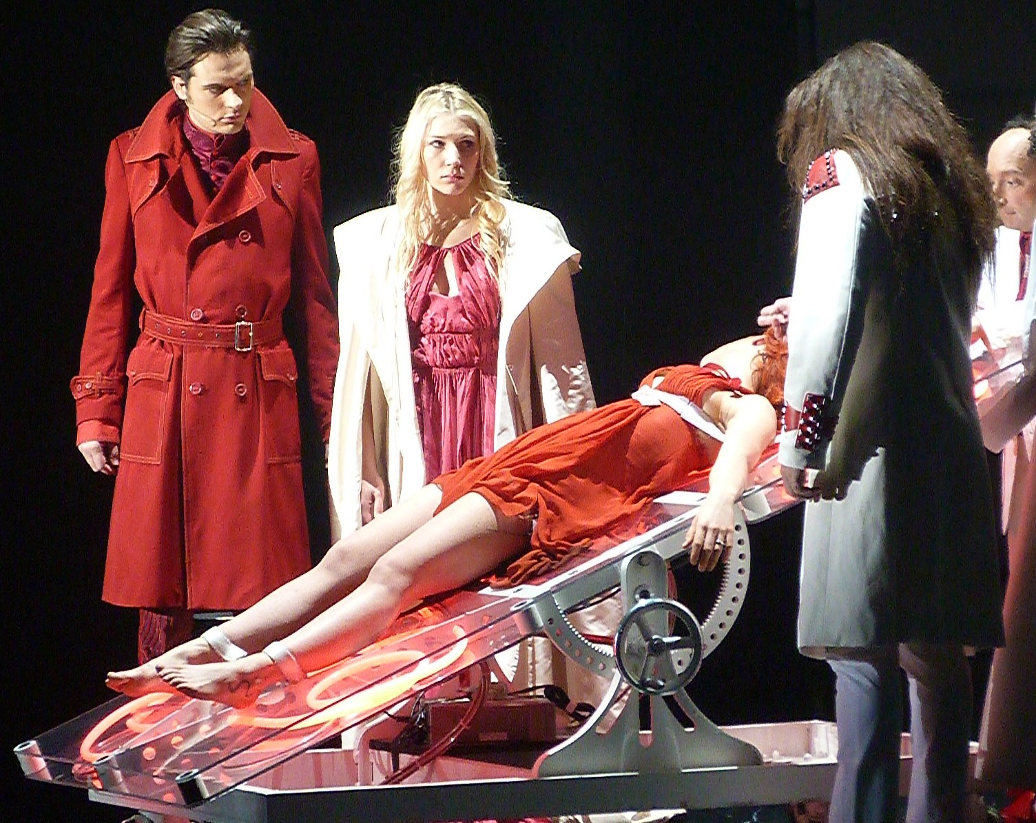 Photographique de la comédie musicale Dracula. De gauche à droite : Jonathan Harker (Julien Loko), Mina Murray (Nathalie Fauquette), Lucie Westenra (Anaïs Delva), Dr Van Helsing (Aymeric Ribot) et le Dr Seward (Laurent Levy).